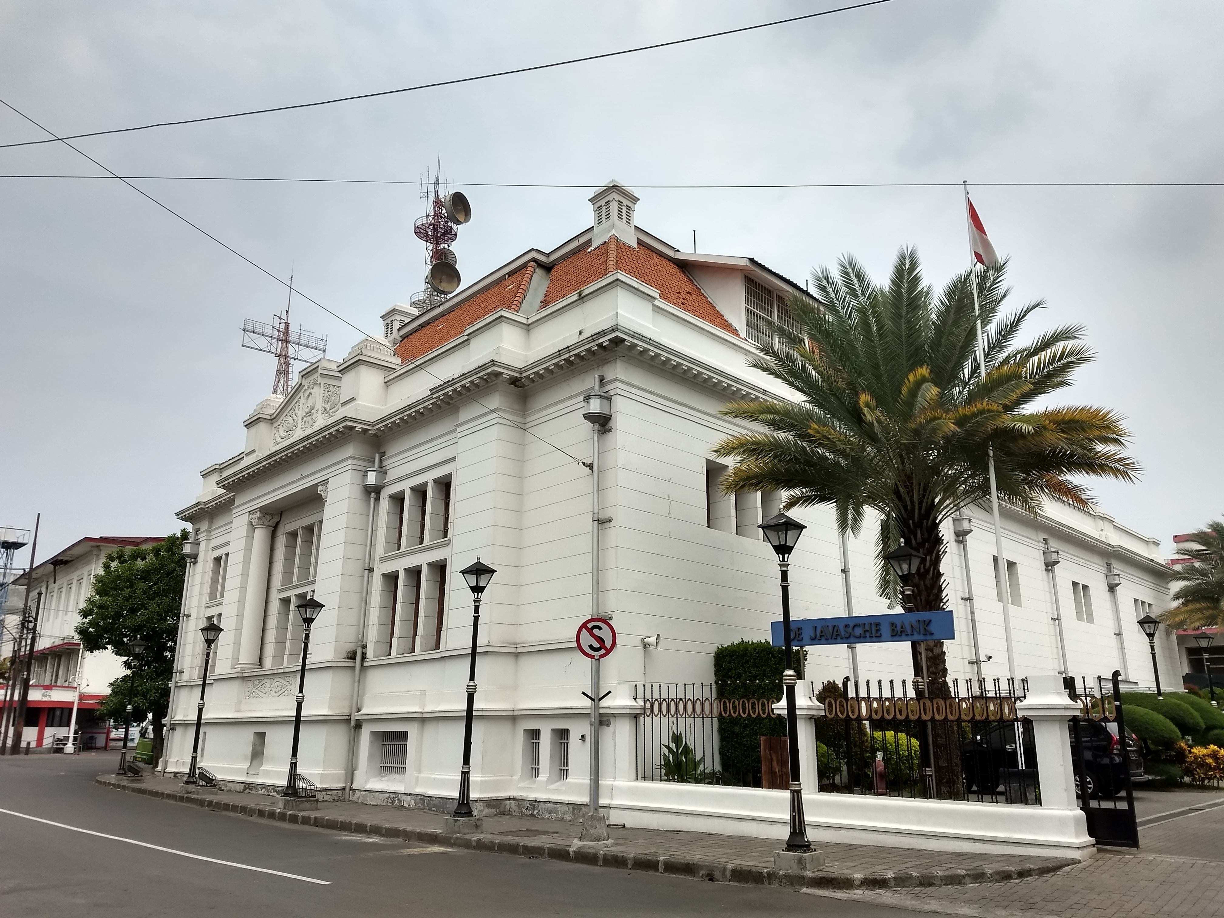 De Javasche Bank - Bank Indonesia Museum Surabaya 2018-11-25